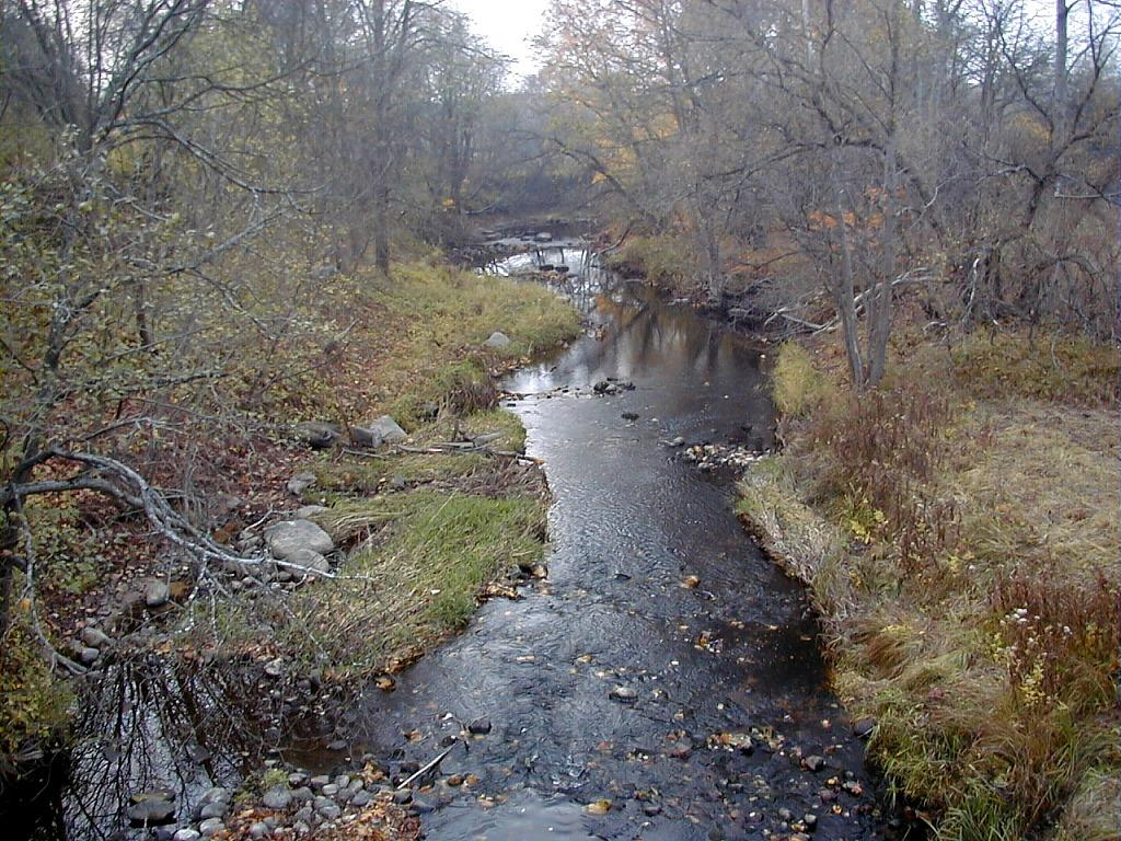 Aģe pie Zvejniekciema 2000-10-21